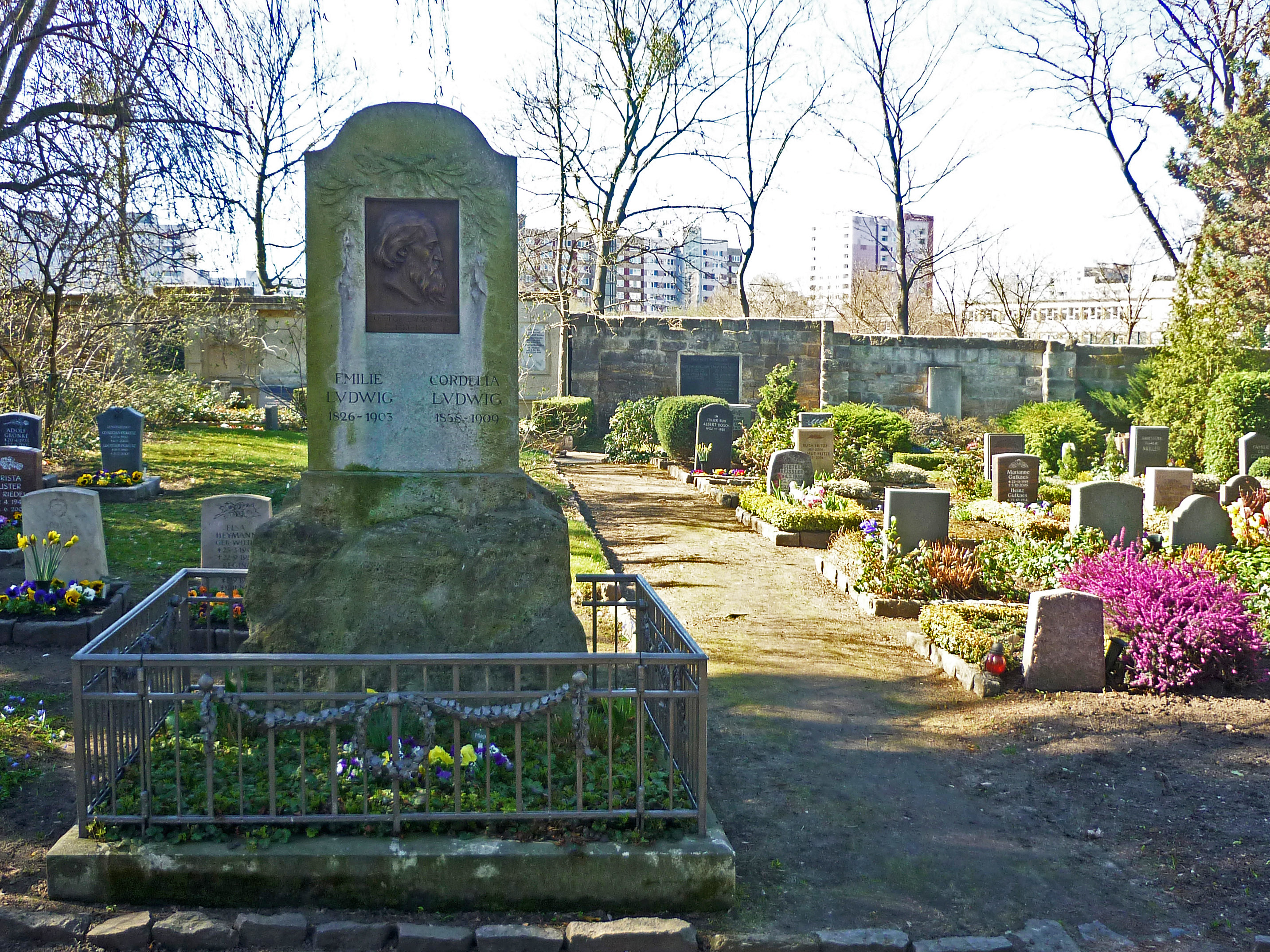 Grabstätte von Otto Ludwig (1813–1865), Schriftsteller, auf dem Trinitatisfriedhof in Dresden